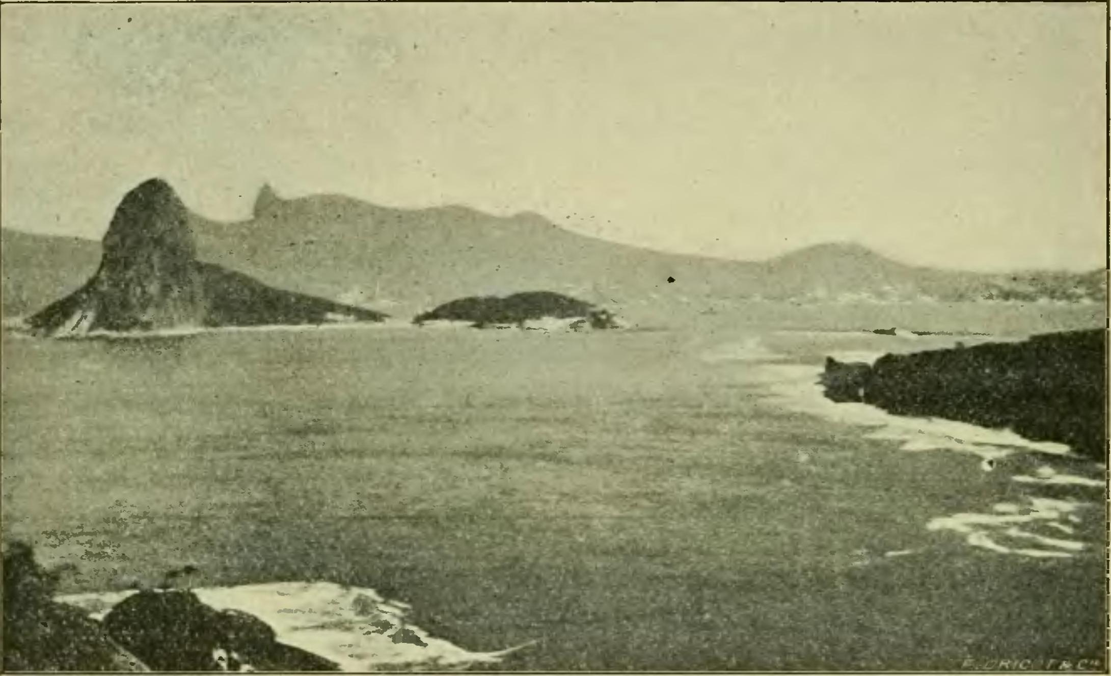 Vista da Baía da Guanabara, circa 1903